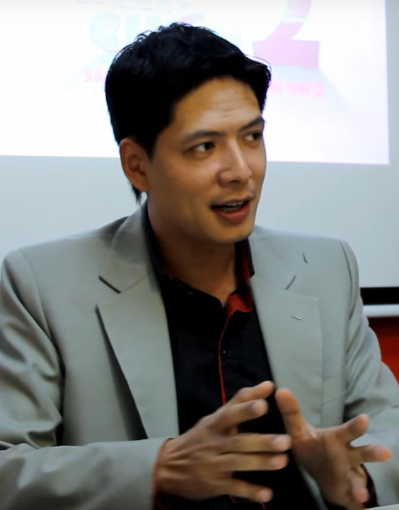 Trích miêu tả: Một Bình Minh "chuẩn Men" có những câu chuyện cực kì hài hước cùng với một Yu Dương tuổi đời còn trẻ nhưng có suy nghĩ như "bà cụ non" làm cho buổi giao lưu rất thân mật và ấm cúng.